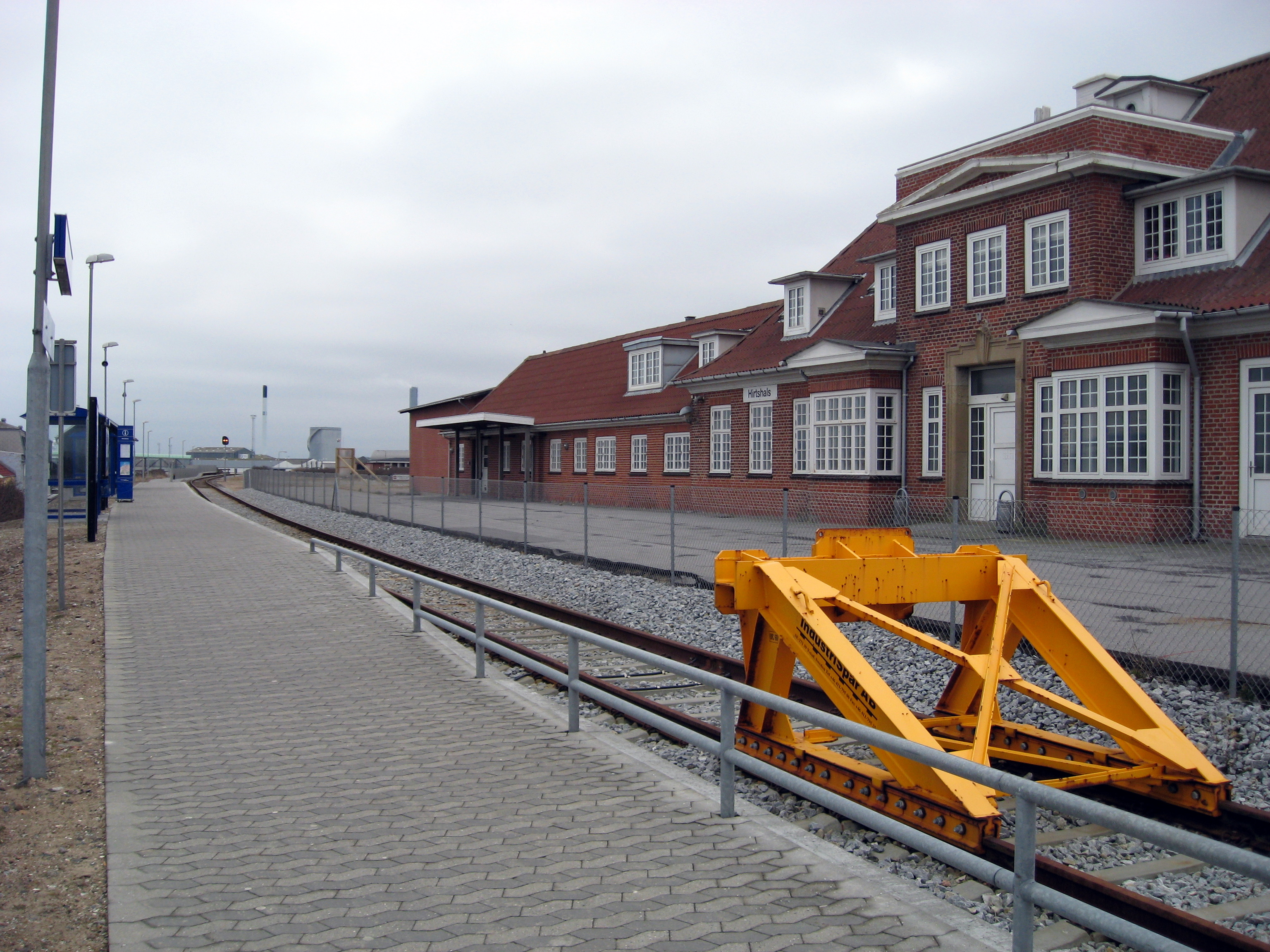 Hirtshals Station er en dansk jernbanestation i Hirtshals, som er endestation på Hirtshalsbanen.